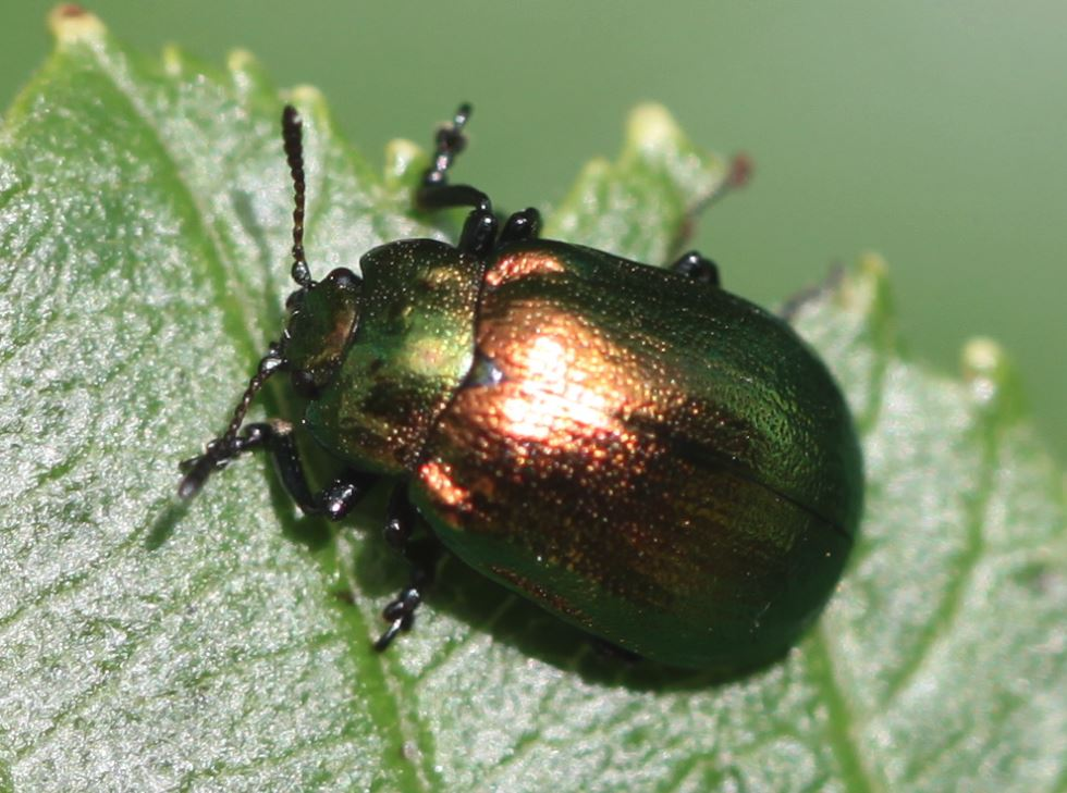 Erzfarbener Erlenblattkäfer (Plagiosterna aenea syn. Linaeidea aenea) am 13. Juni 2019 am Schwarzen Grat (Allgäu).